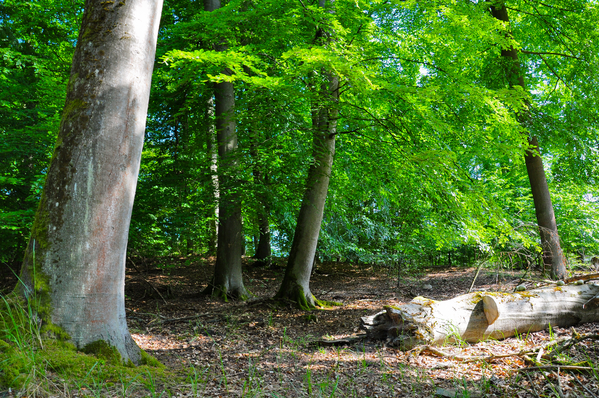 Müritz-Nationalpark, Ostteil Serrahn: Im Serrahner Buchen-Altwald findet sich eine große Menge Totholz.